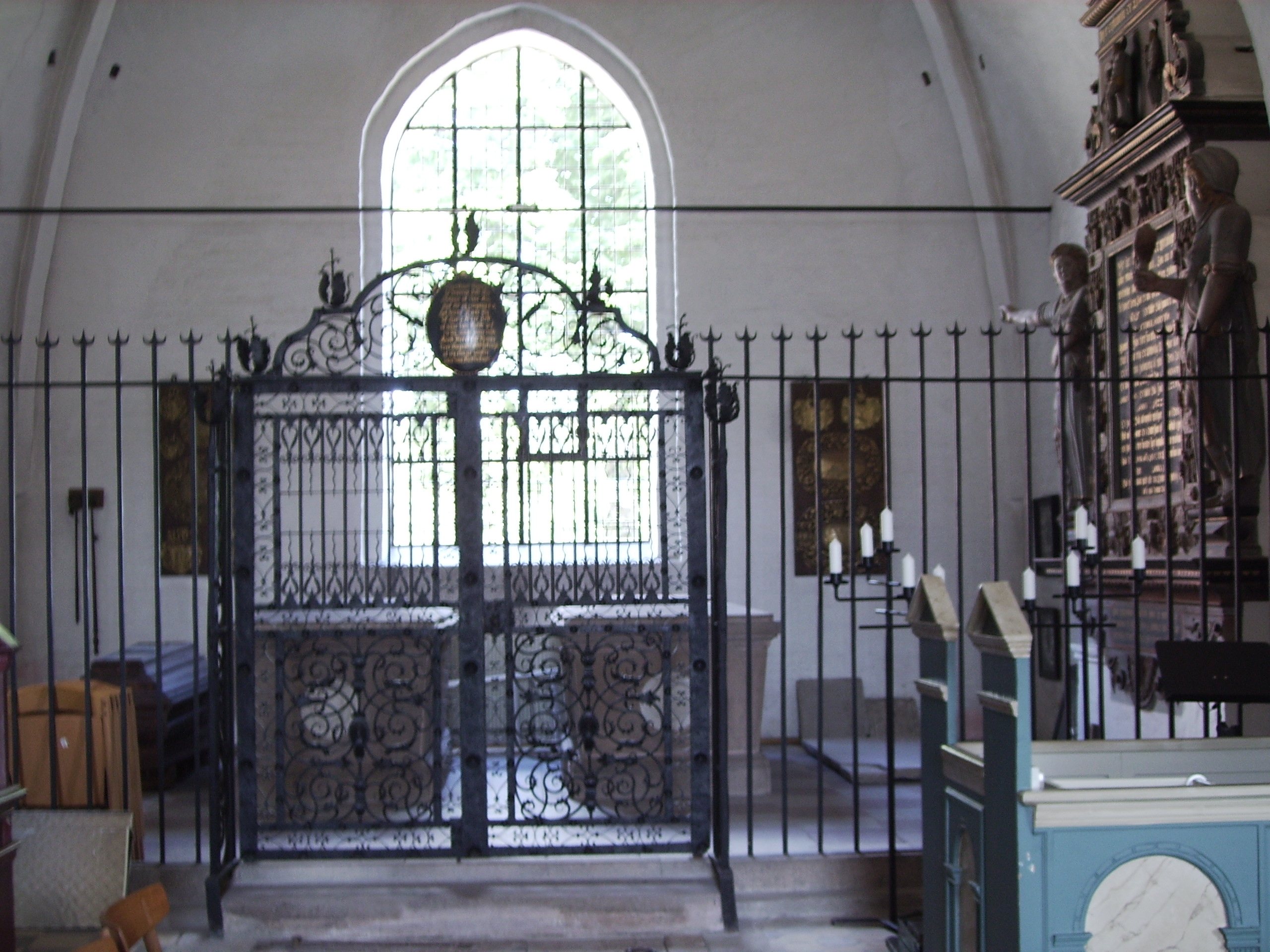 Fraugde Kirke, Fraugde Sogn, Åsum Herred, Odense Amt, Denmark (Danish Church) - Gravkapel i Fraugde Kirke